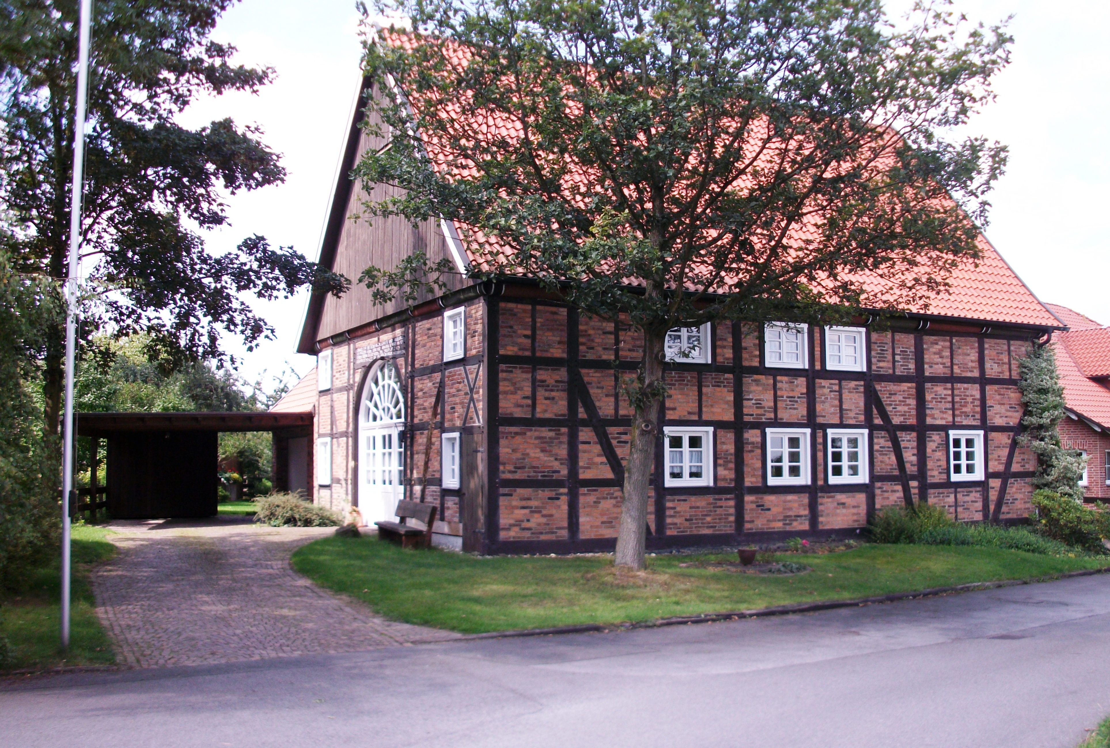 Denkmal Karl-Bender-Straße 2 in Arnsberg-Voßwinkel